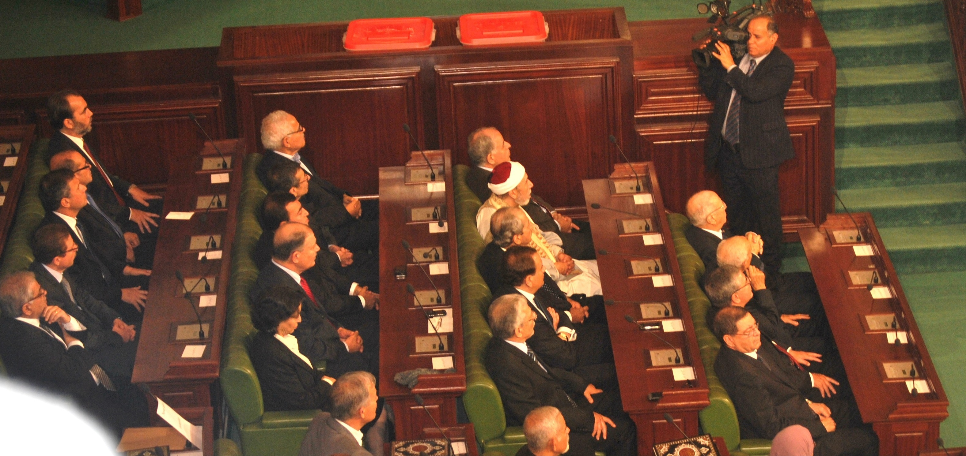 Le gouvernement de Béji Caid Essebsi lors de la séance inaugurale de l'ANC tunisienne.